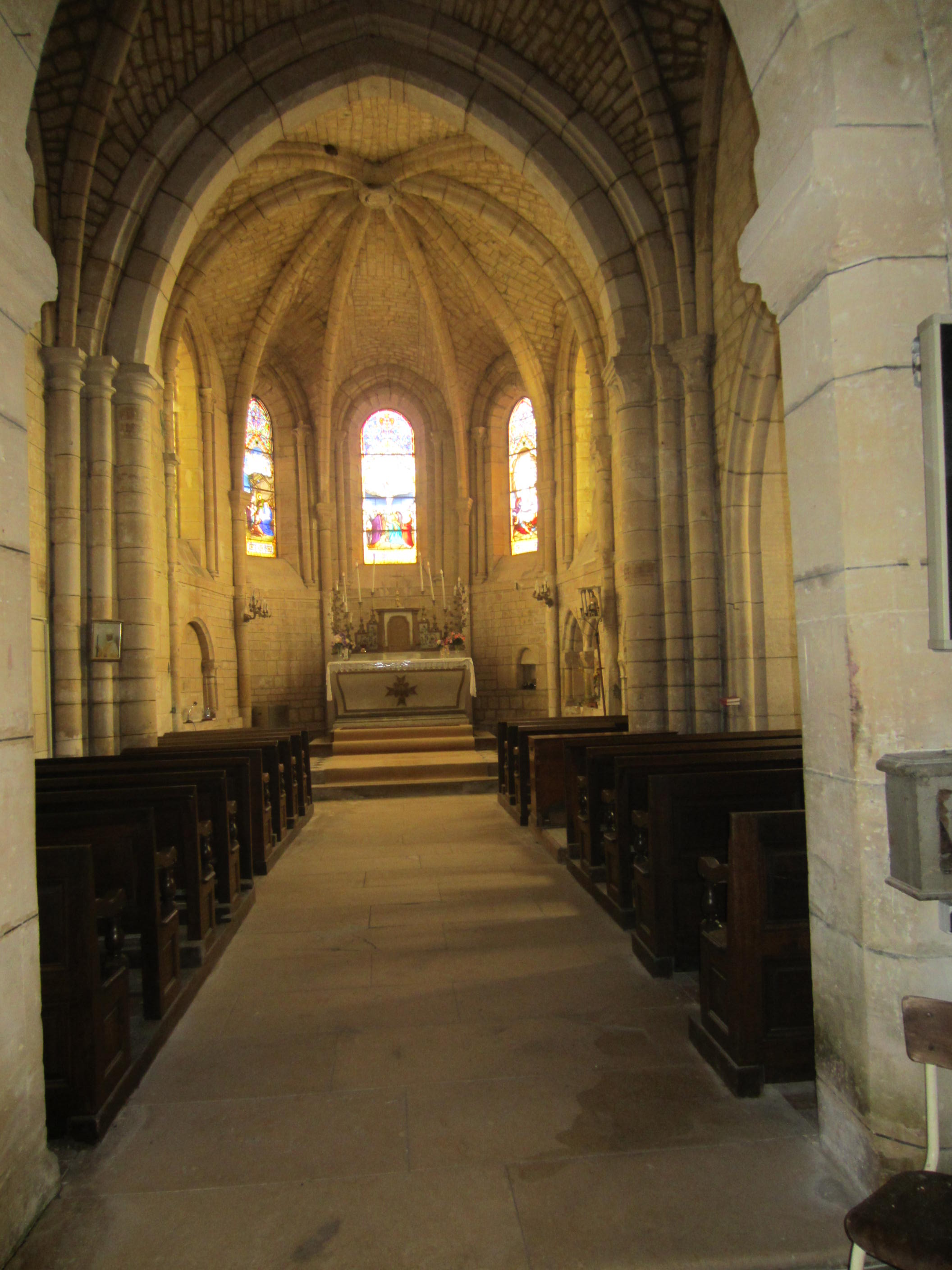 Photo prise de la nef